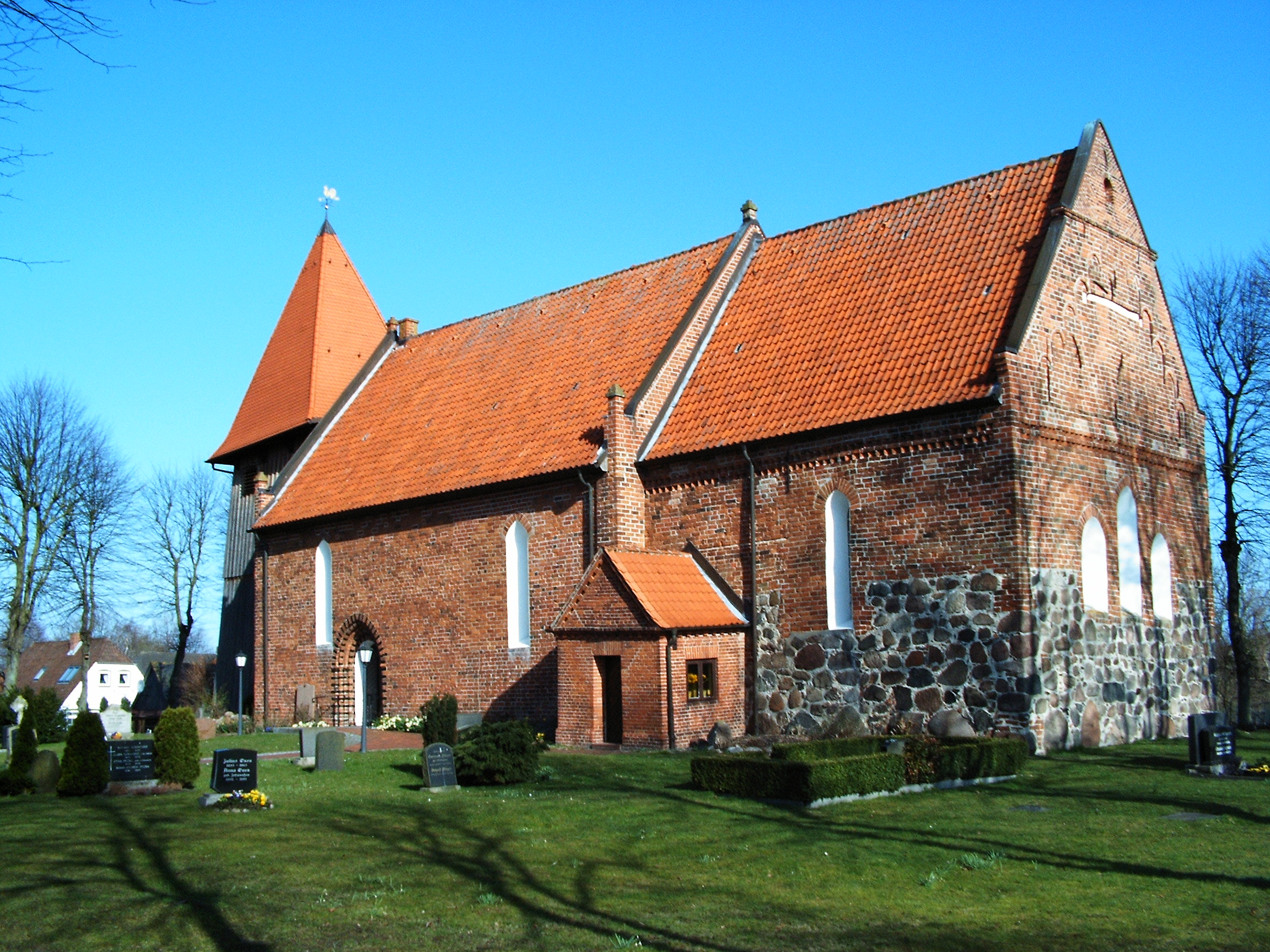 Evangelische Kirche in Großenbrode